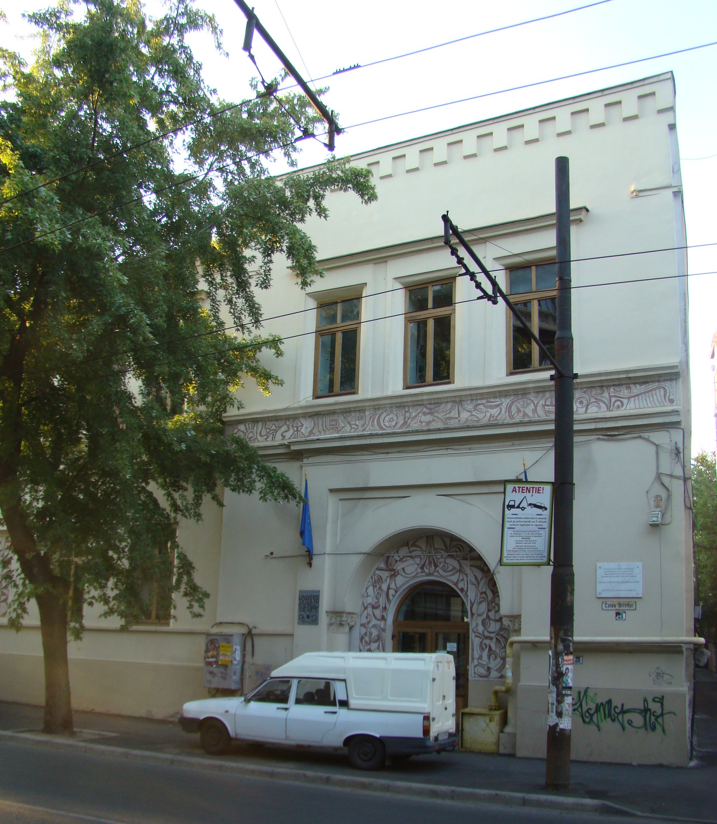 Casă monument istoric, Calea Griviței, nr.28